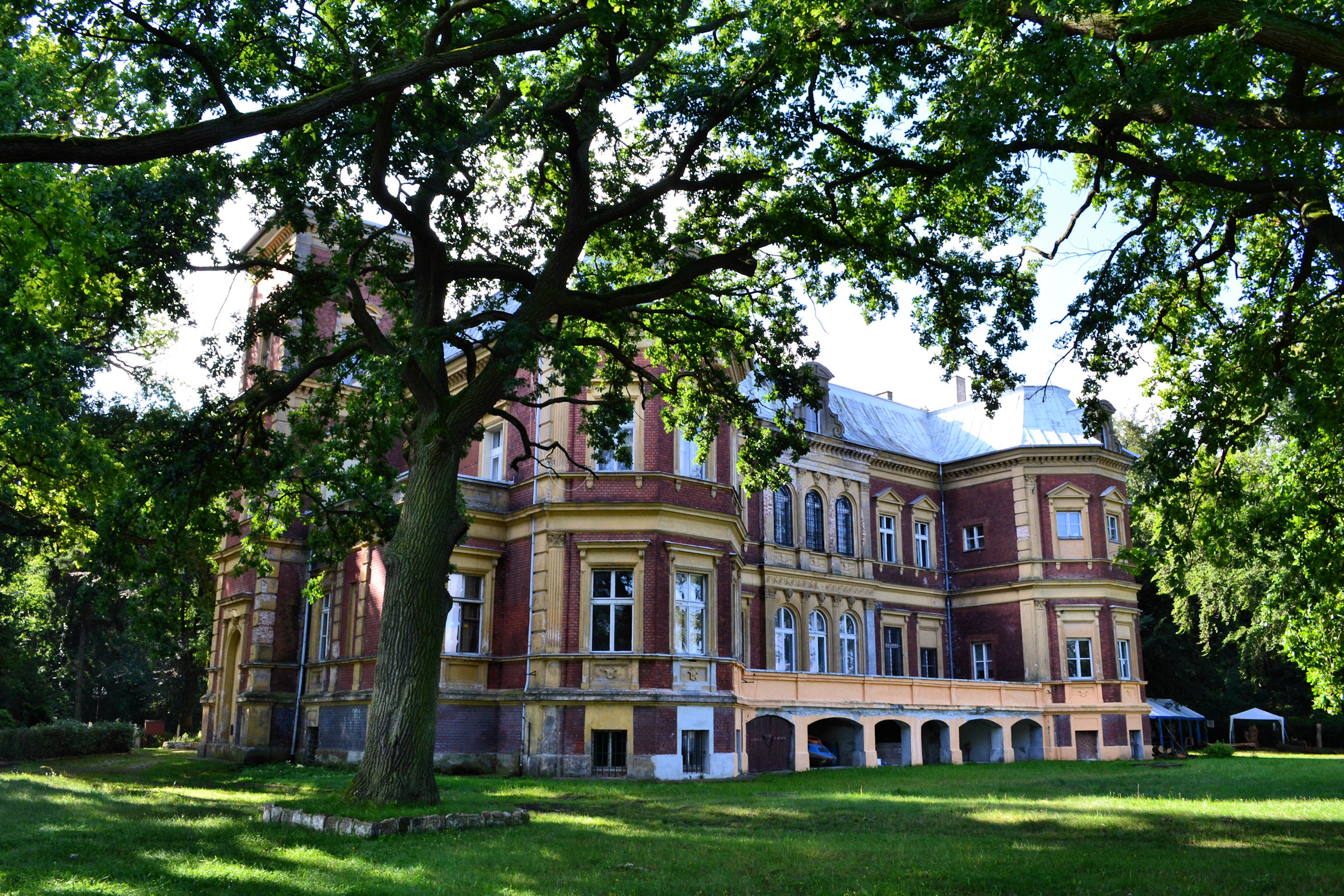 Pałac w Karsznie (Nowe Warpno)